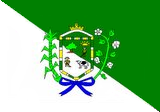 Bandeira do Município de Belém no estado da Paraíba, Brasil./ Flag of Paraíba's city Belém, Brazil